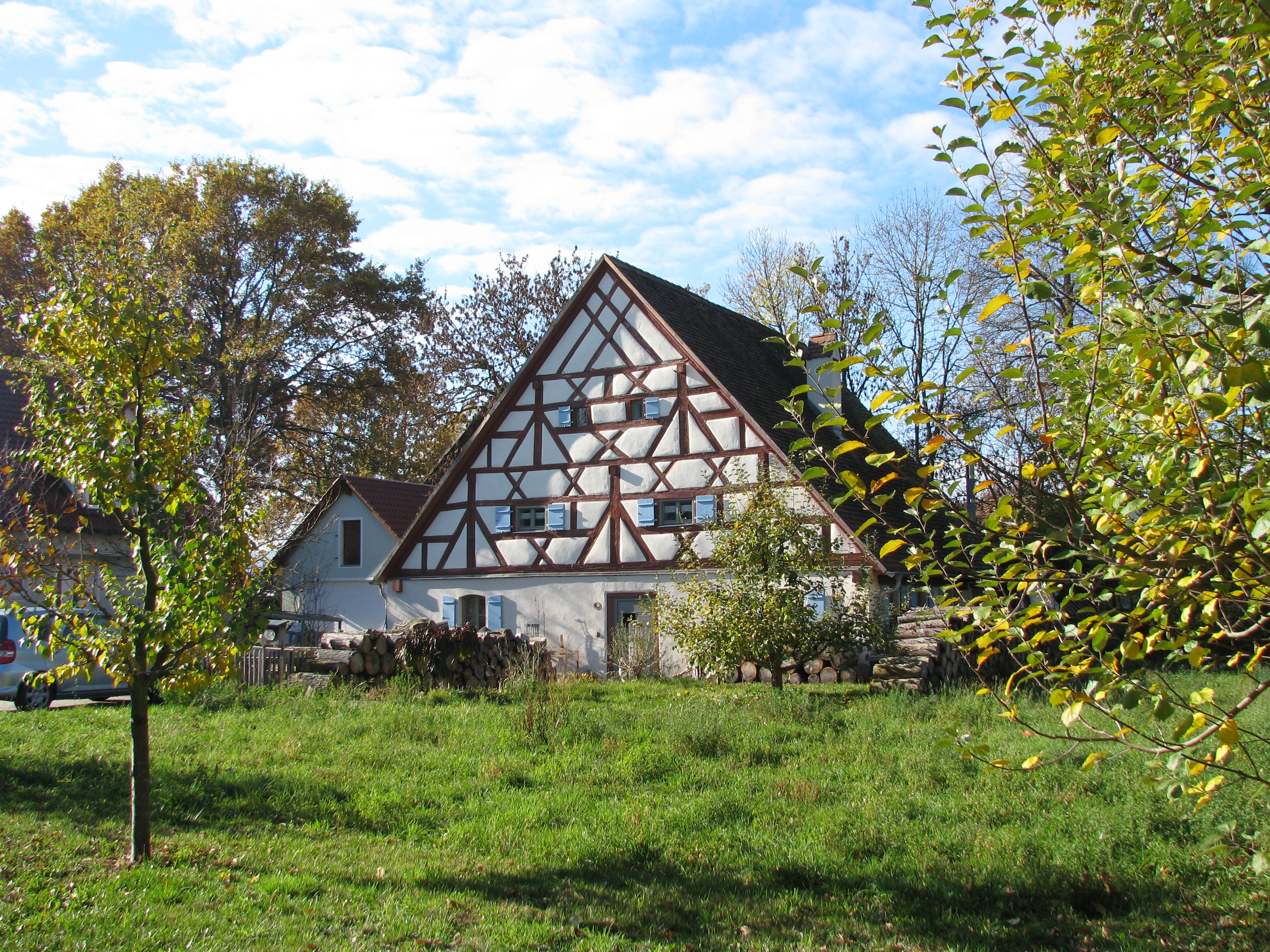 Karm, Ortsteil von Hilpoltstein im mittelfränkischen Landkreis Roth (Bayern), Wohnstallhaus mit Fachwerkgiebel